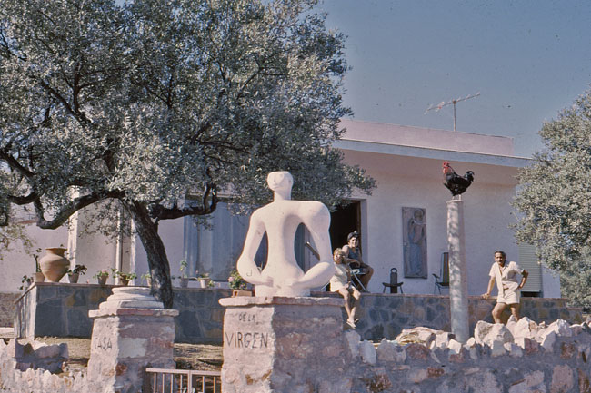 Chalet de Torremolinos en donde Antonio Cano y su familia pasaban las vacaciones de verano y en donde proseguian con su labor creativa. En la foto, tomada en 1965 se puede ver a Antonio Cano junto a su esposa, la también escultora Carmen Jiménez Serrano y su hija Mari Carmen. En la parte superior de la puerta de acceso al jardín se puede ver un Torso de piedra artificial, realizado por Antonio Cano en 1965. En la pared de acceso a la vivienda se puede ver un relieve de la Anunciación, realizado por su esposa Carmen Jiménez Serrano.